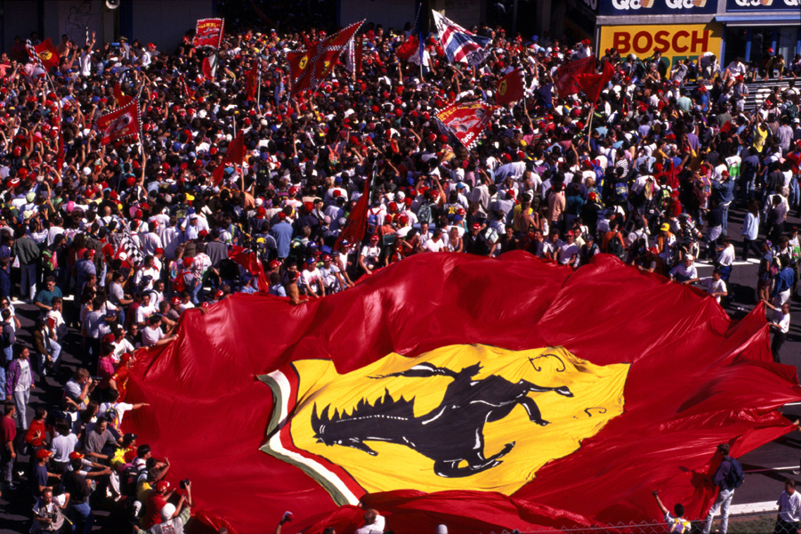 Supporters de Ferrari lors du Grand Prix de Monza en 1996 Prise à San Giorgio, La Lombardie Mis en ligne le 1er février 2008